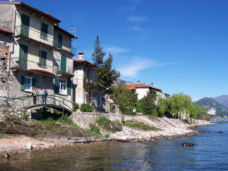 Scorcio dell'Isola dei Pescatori